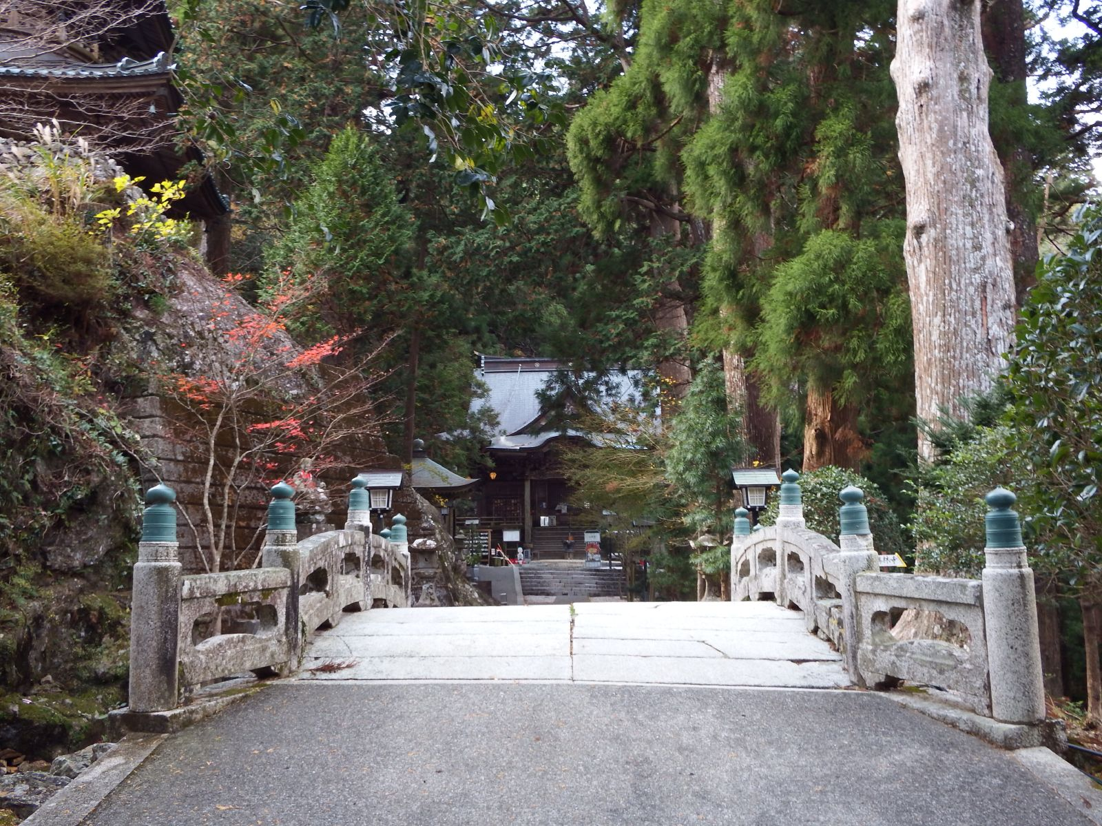 太龍寺の大師堂